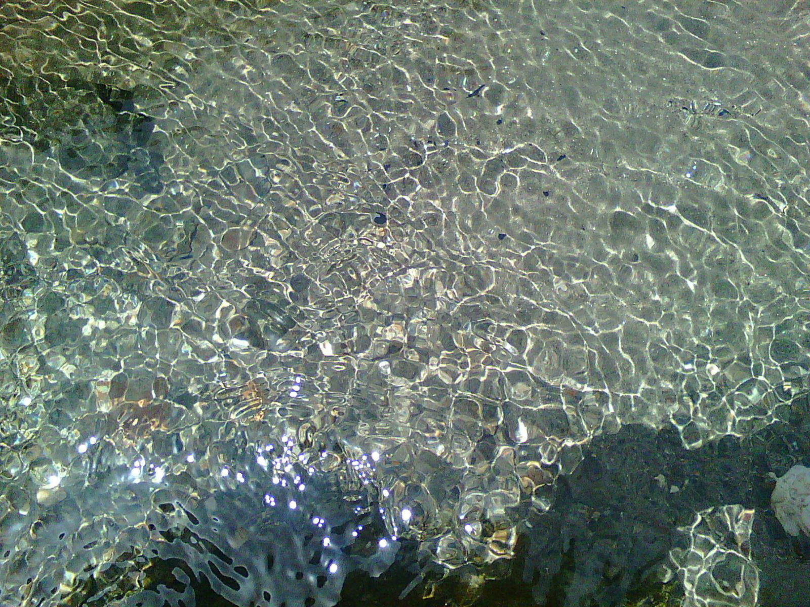 زلالی چشمه‌ کوهستان الوند